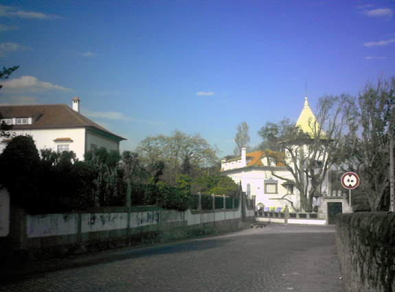 Calves, Beiriz, Póvoa de Varzim